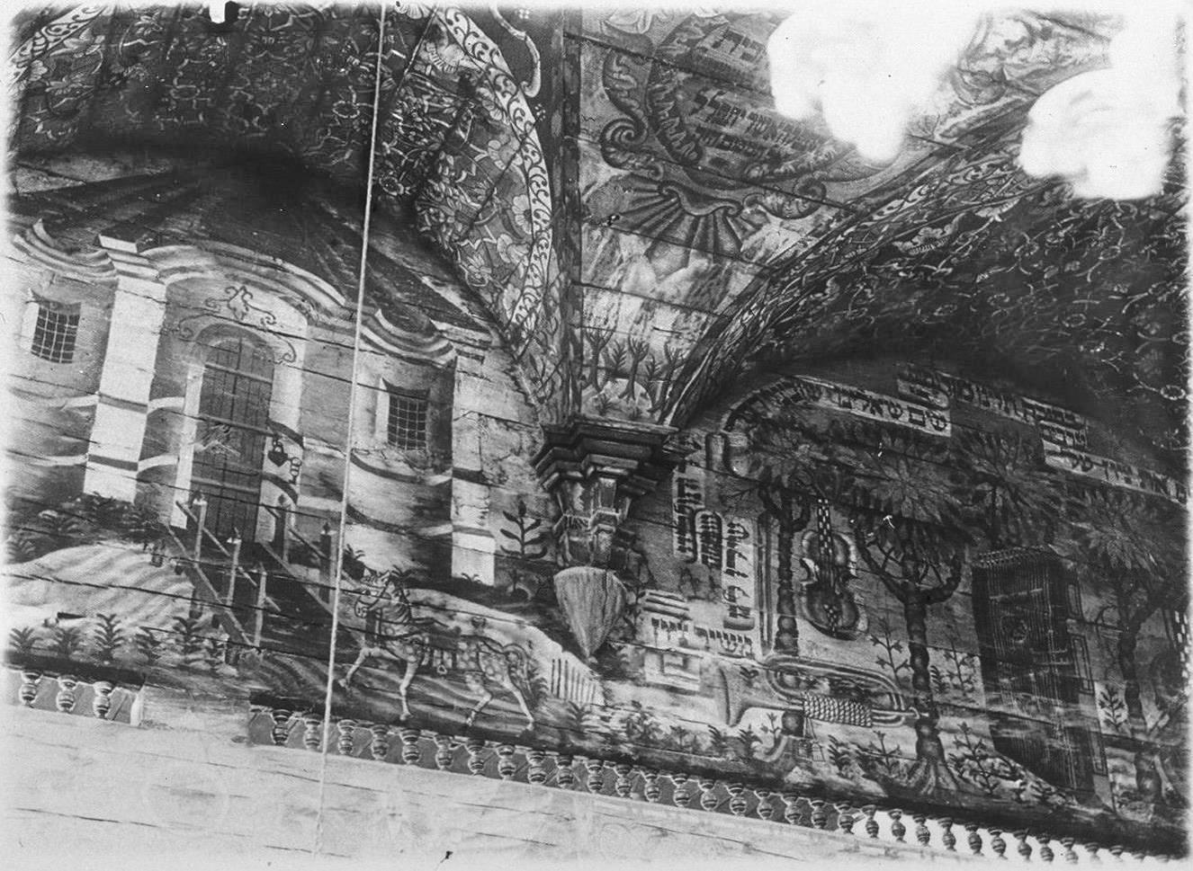 Роспись 1765 года в деревянной синагоге в Ярышеве.